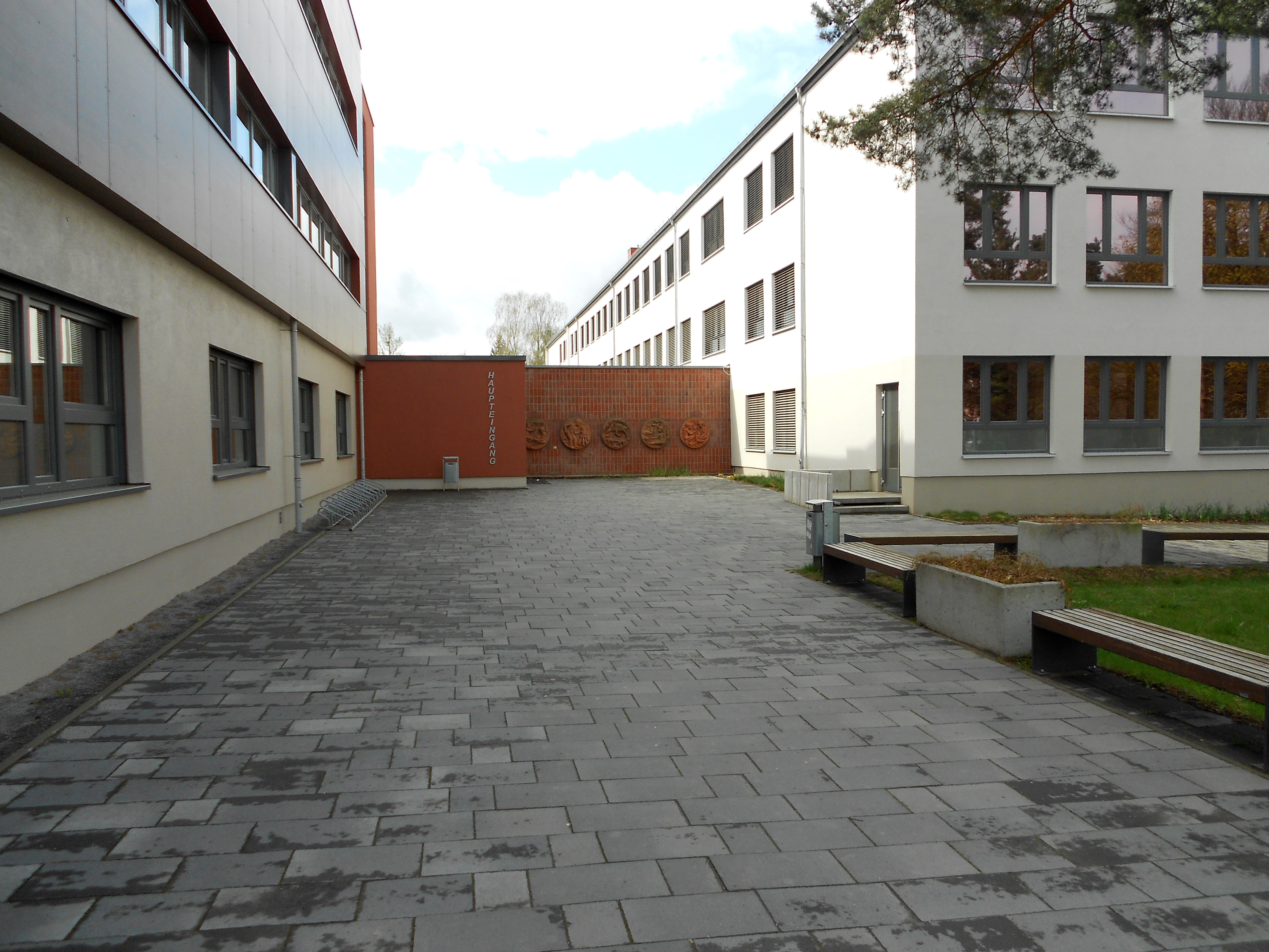 Eberswalde Westend Wildparkstraße Skulpturen von Baldur Schönfelder und Axel Schulz